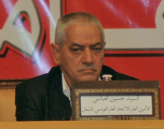 Le SG de l'UGTT Houcine Abassi lors du congrès national pour Le dialogue national en Tunisie recherche le consensus